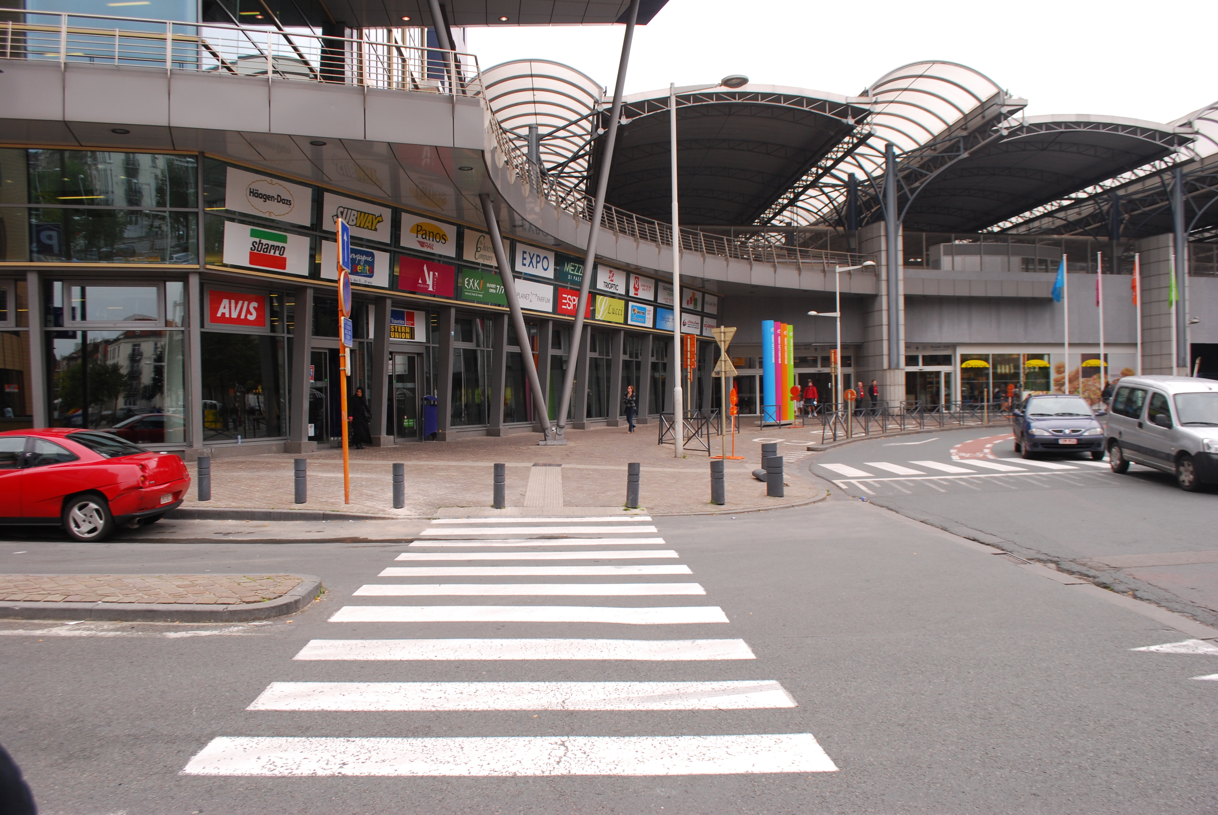 Vue de la gare de Bruxelles-Midi, à l'angle de la rue de France et de la rue de l'Instruction.